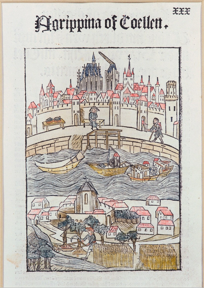 Holzschnitt: Koelhoffsche Chronik (1499)